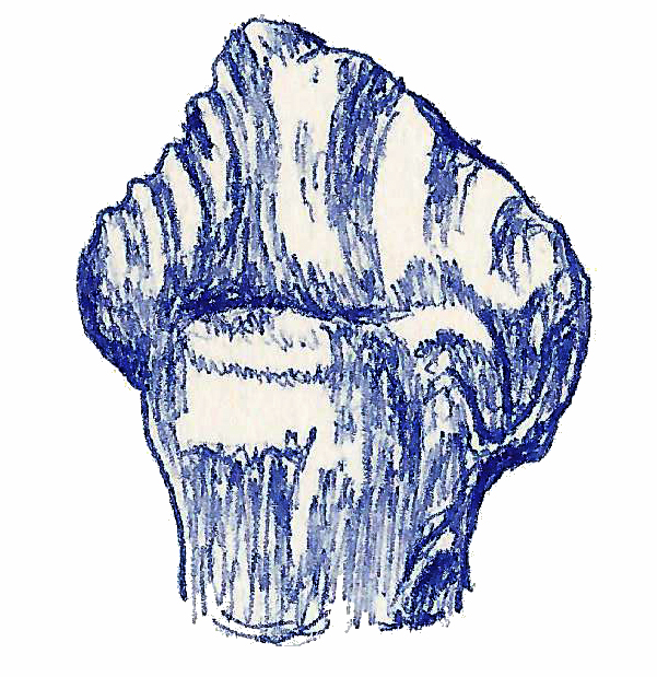 Illustration of a fossil of Priconodon